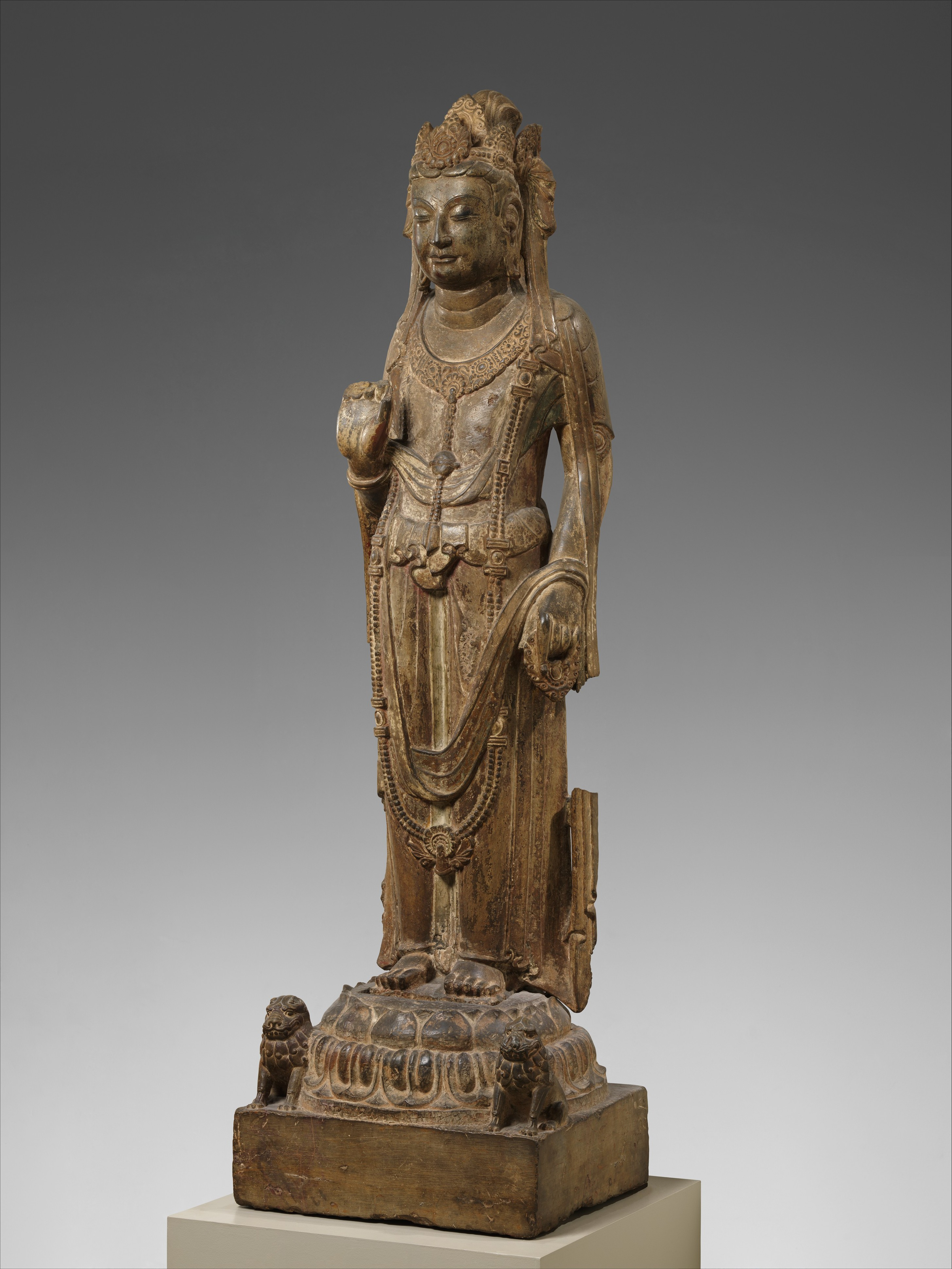 China; Figure; Sculpture